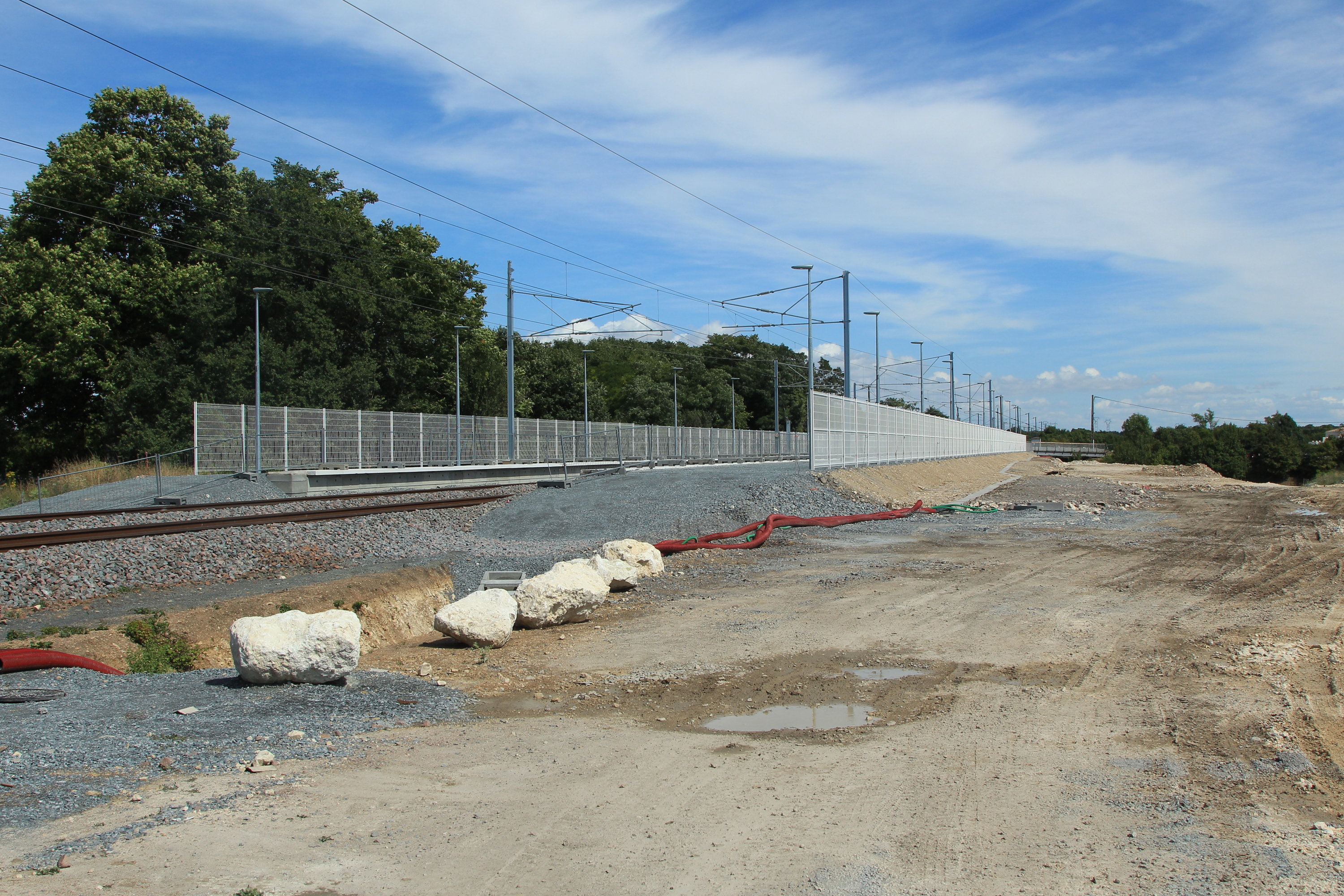 Travaux de réouverture de la gare de La Jarrie, en Charente-Maritime, France.